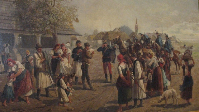 Einquartierung von Husaren in einem ungarischen Dorf